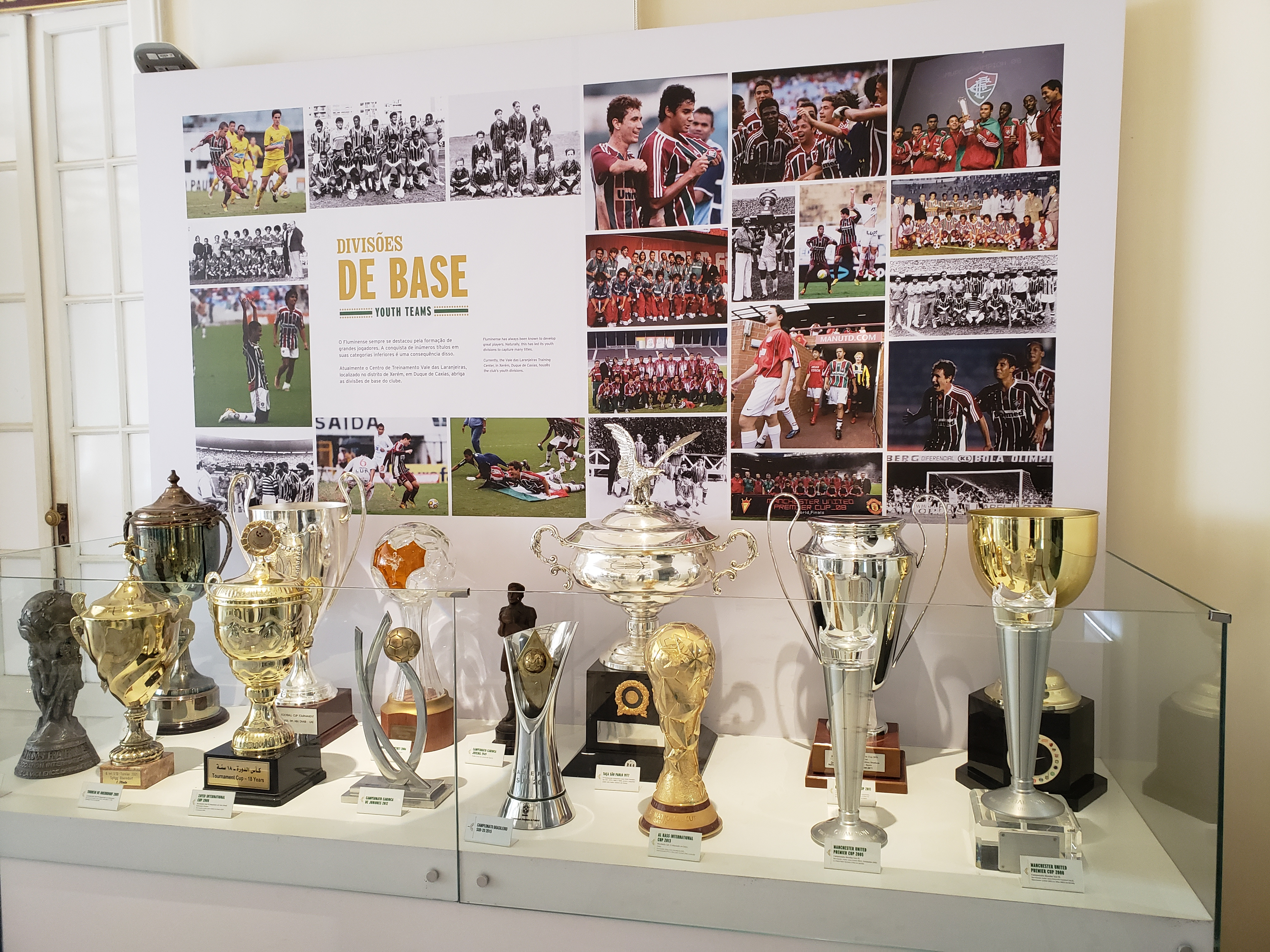 Títulos destacados do Fluminense nas categorias de base, expostos na Sala de Troféus do clube.